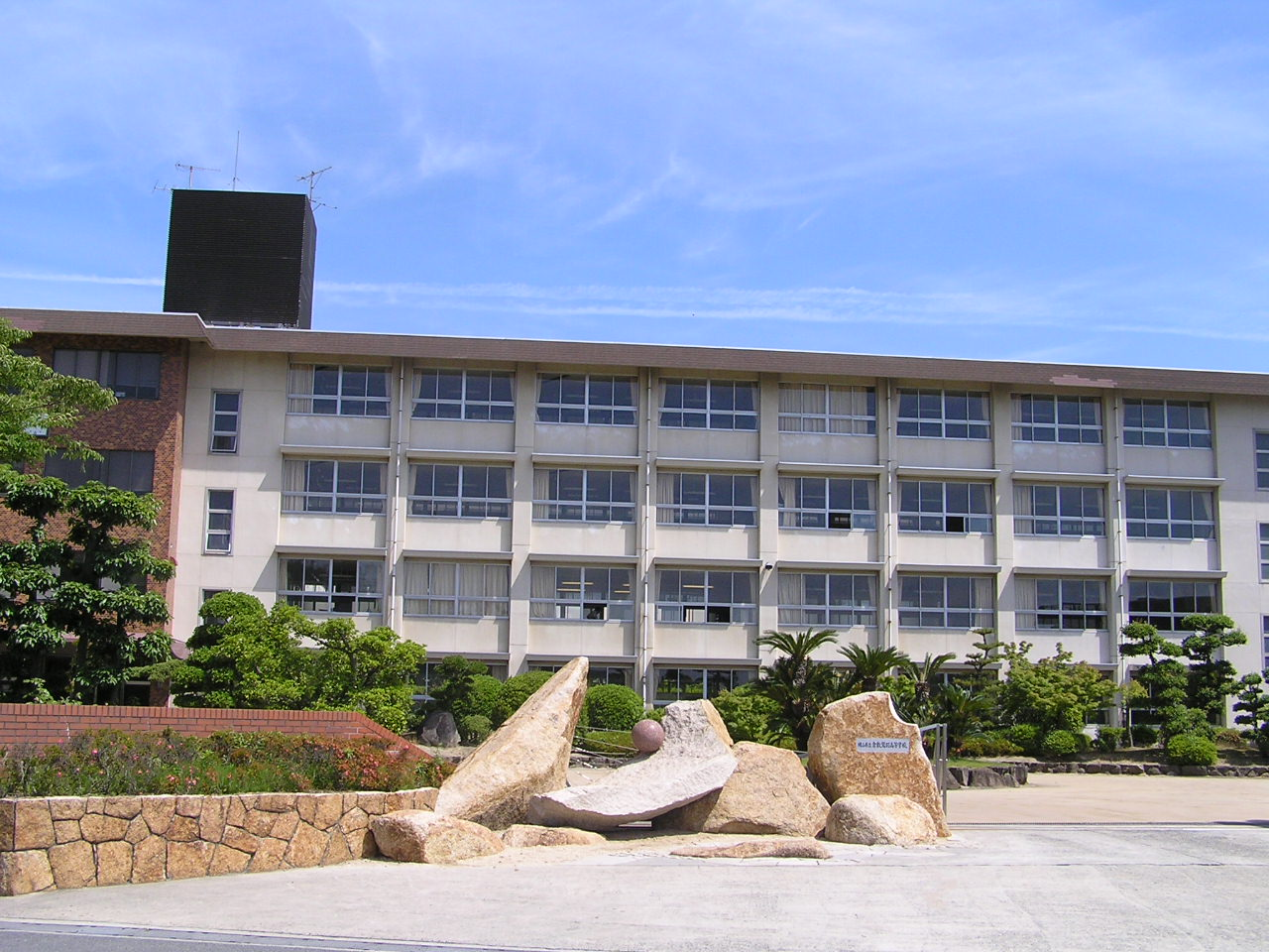 Kurashiki Washu high school